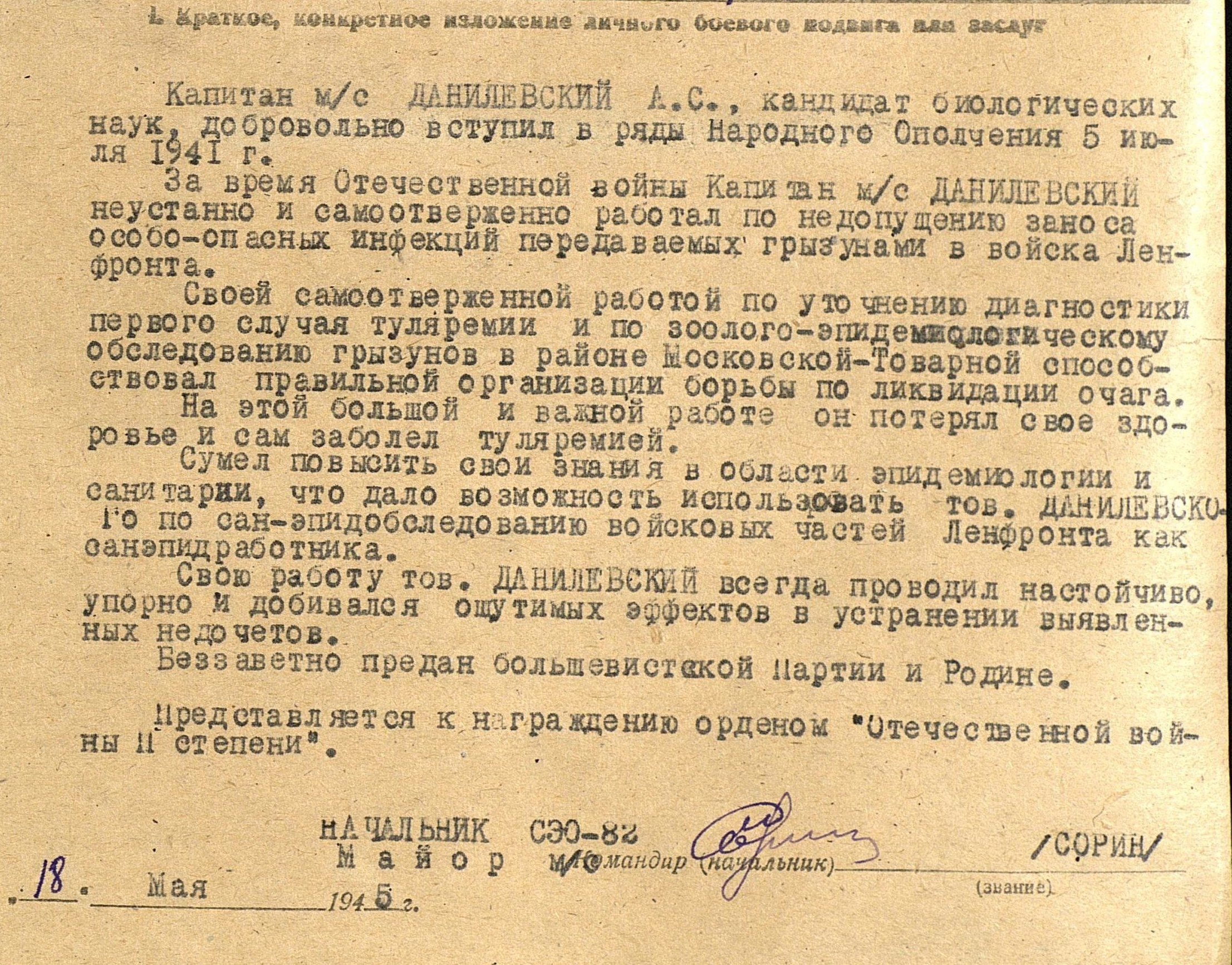 Нагородний лист ентомолога О. С. Данилевського (фрагмент)